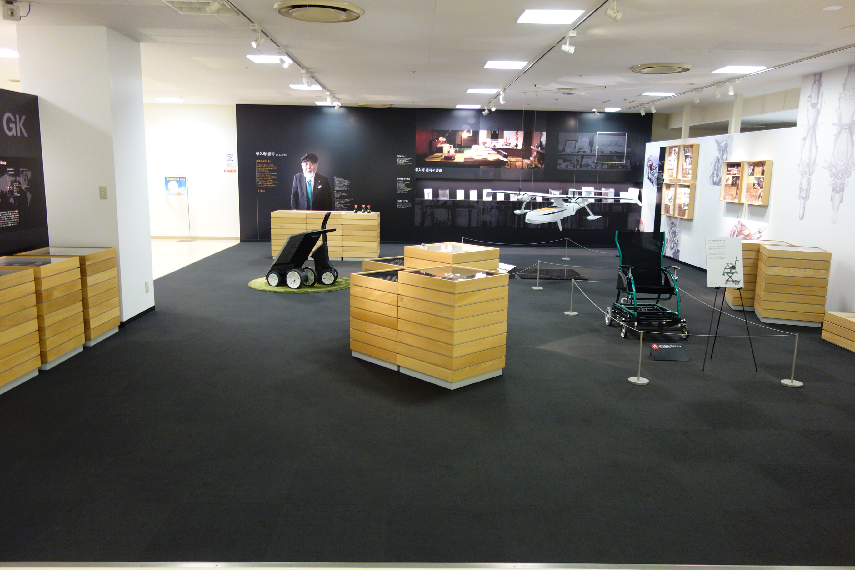 広島県福山市のRiM-fにある栄久庵憲司展示室